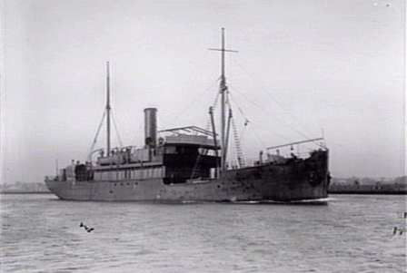 Die MAWATTA , derehemalige deutsche Postdampfer GERMANIA